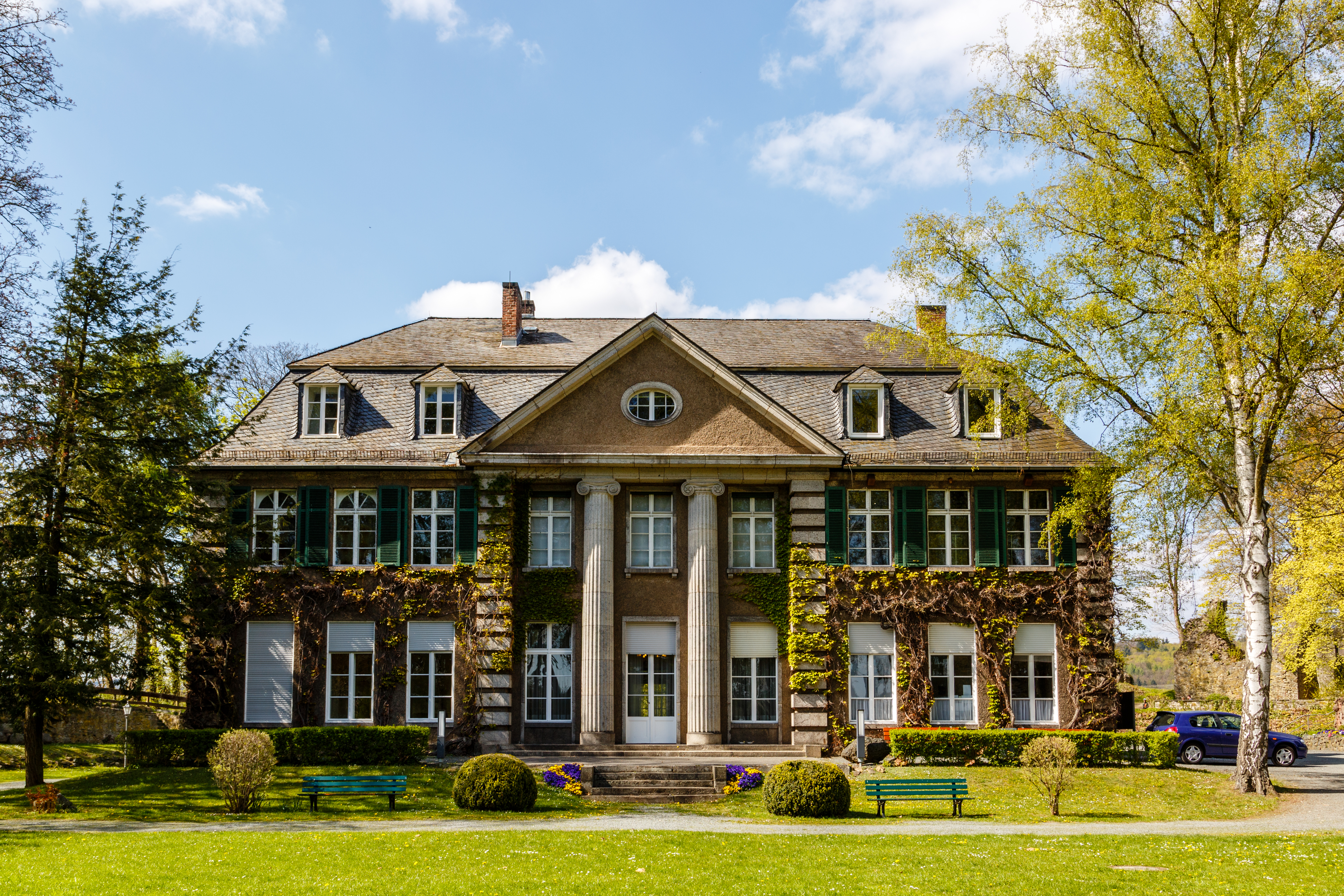 Dillenburg - Grün'sche Villa auf dem Schloßberg